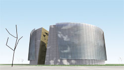 Vista exterior Juzgado de Menores